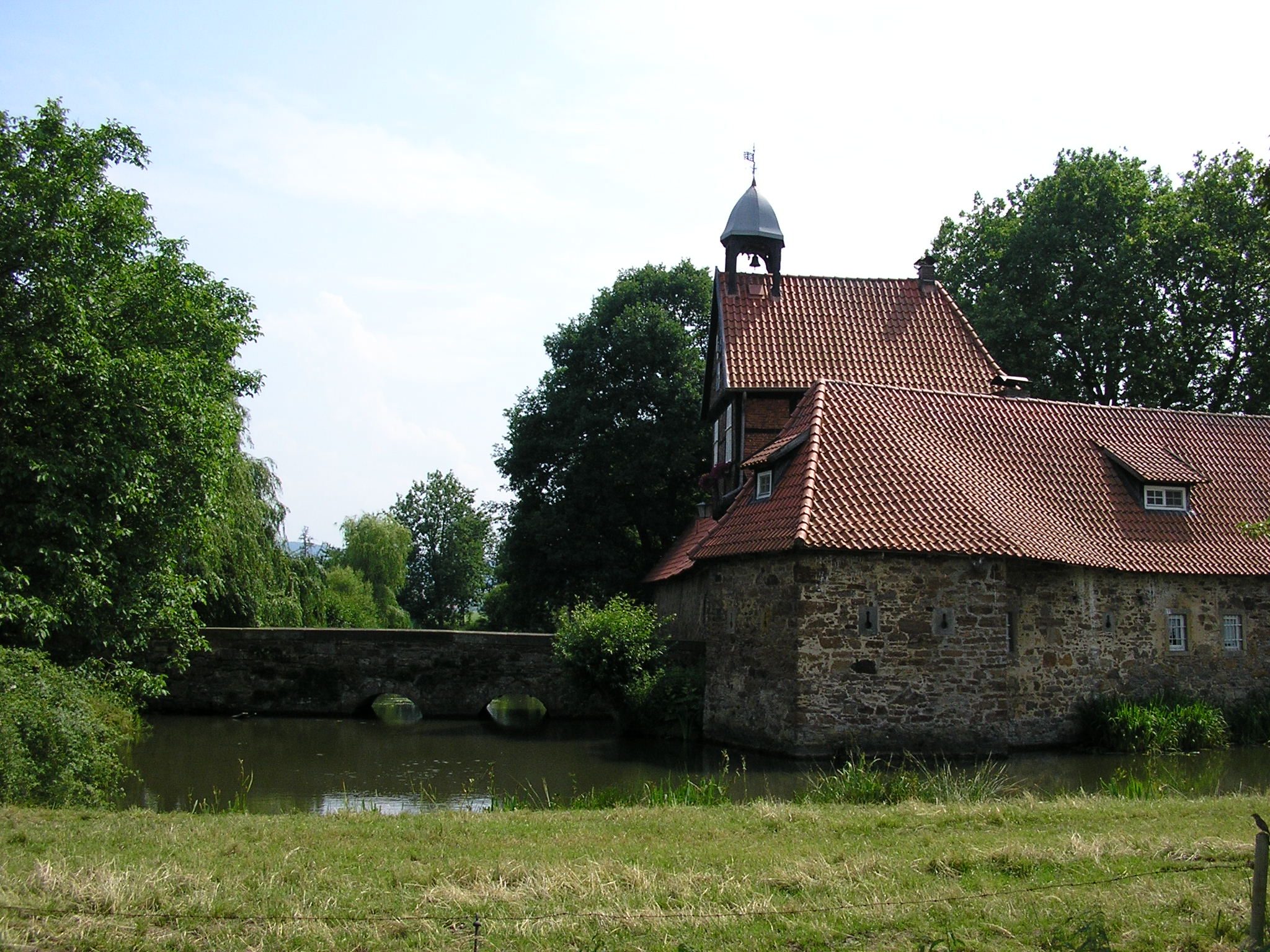 Das Gut und Wasserschloss Stockhausen in Stockhausen